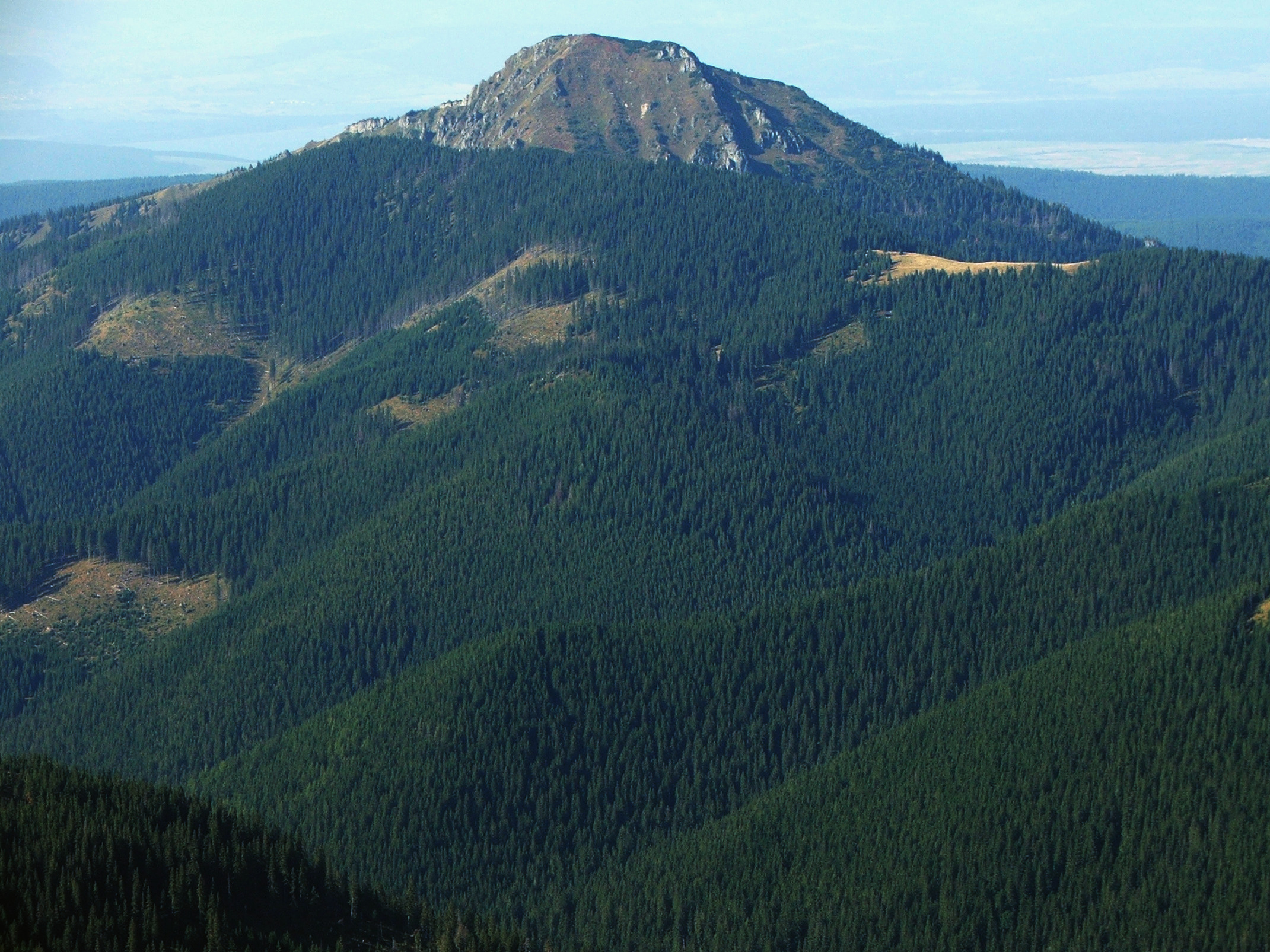 Osobita (slov. Osobitá), West Tatra Mountains